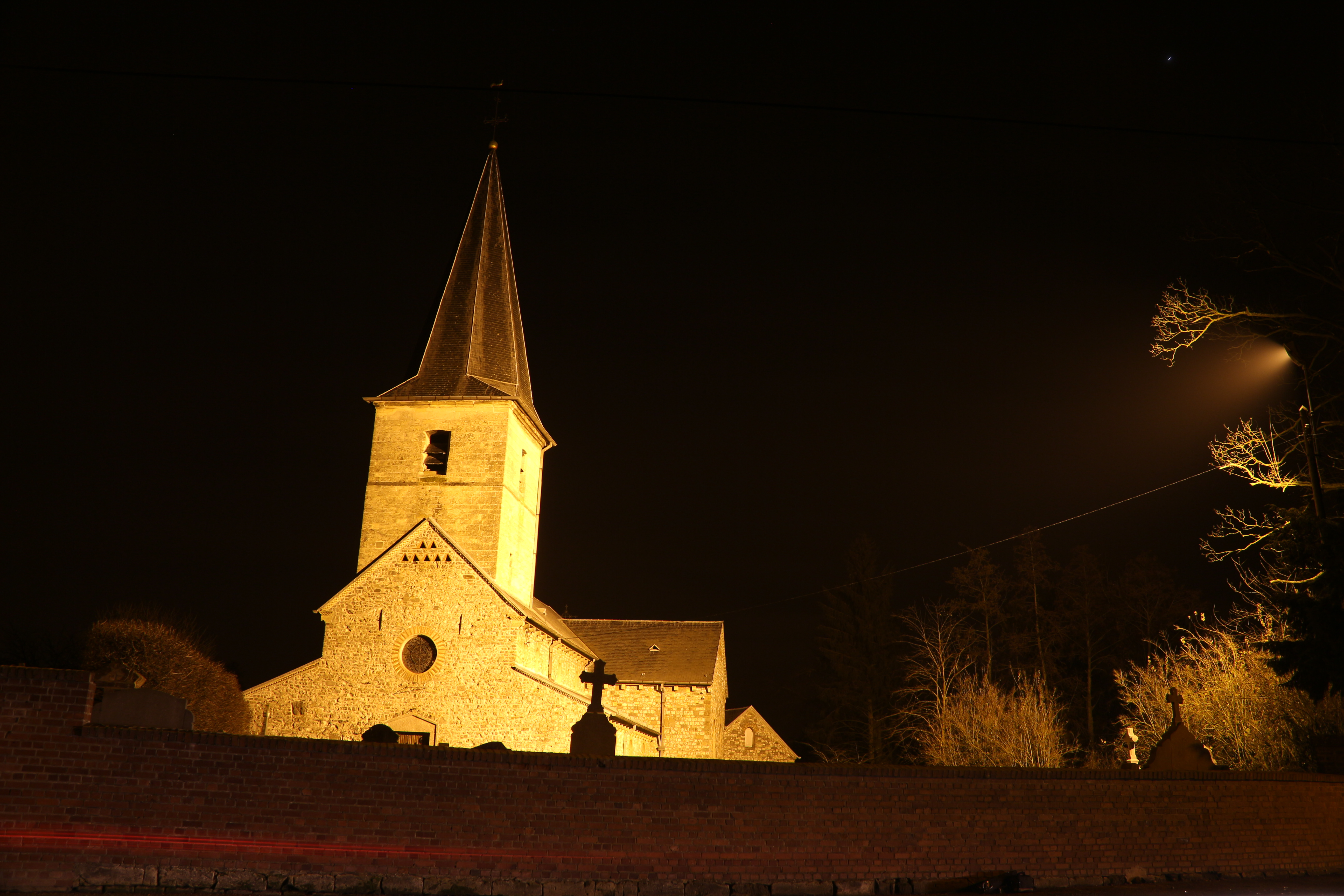 De kerk van Neerrepen